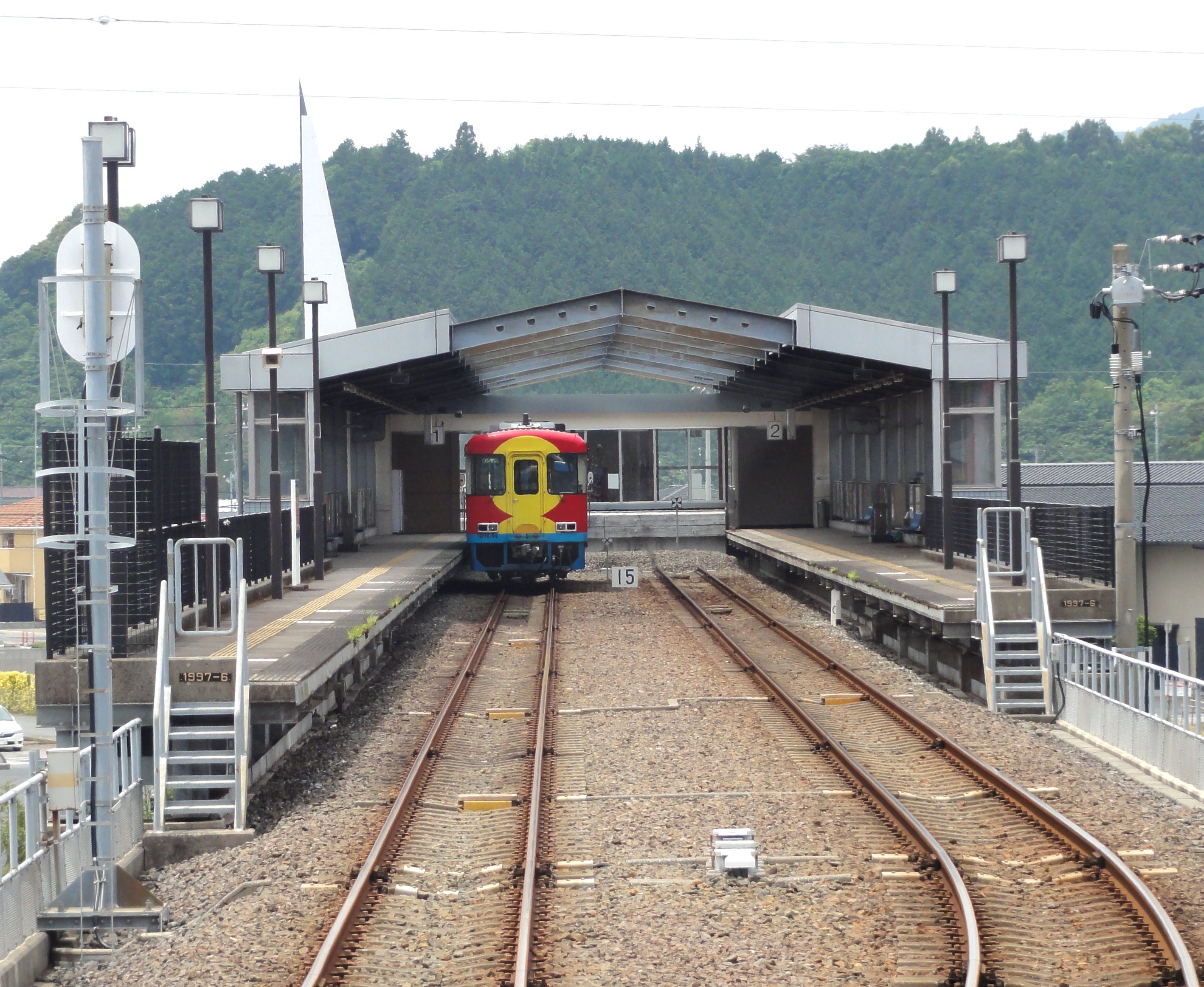 宿毛駅ホーム